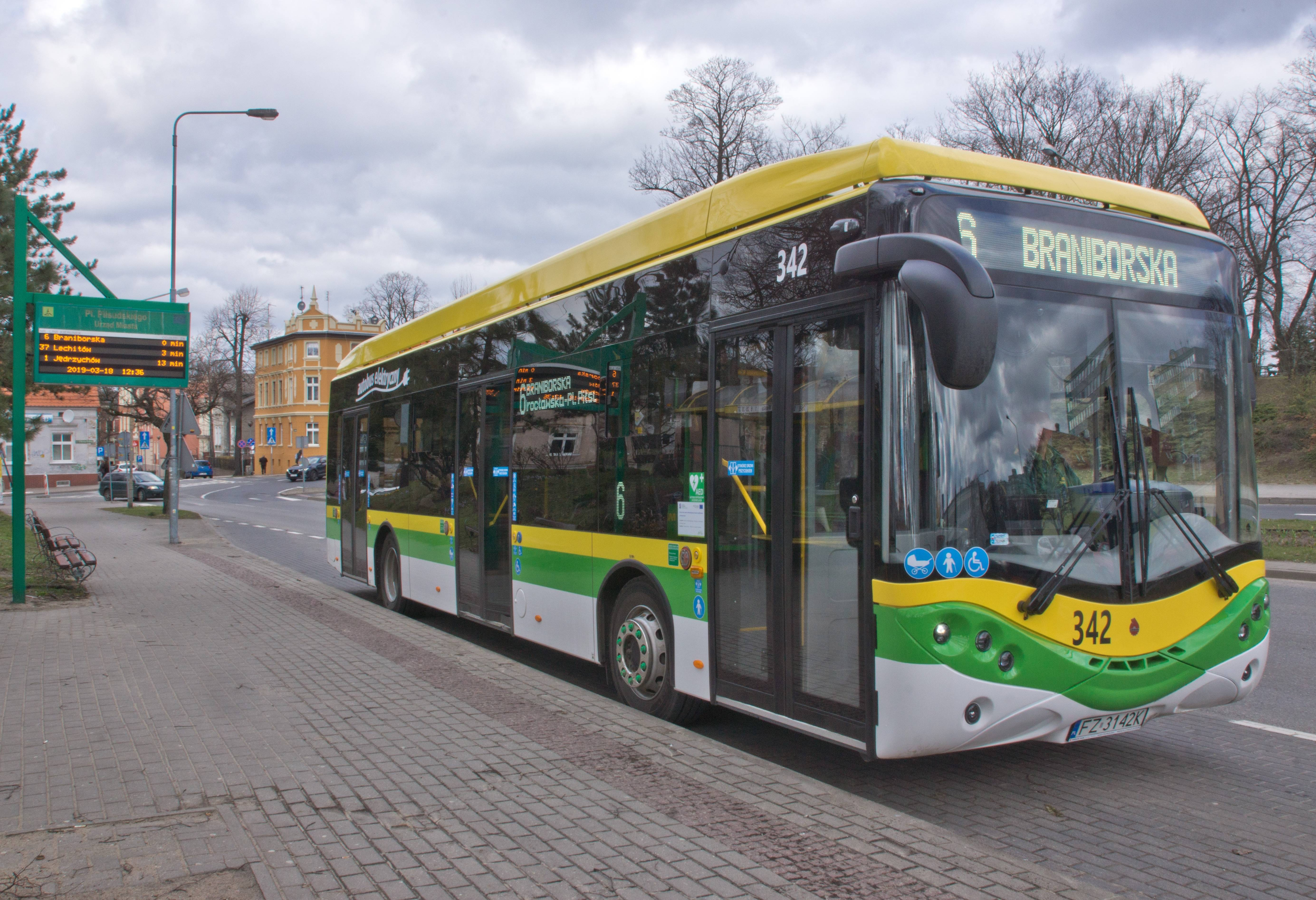 Autobus miejski Ursus City Smile w Zielonej Górze.